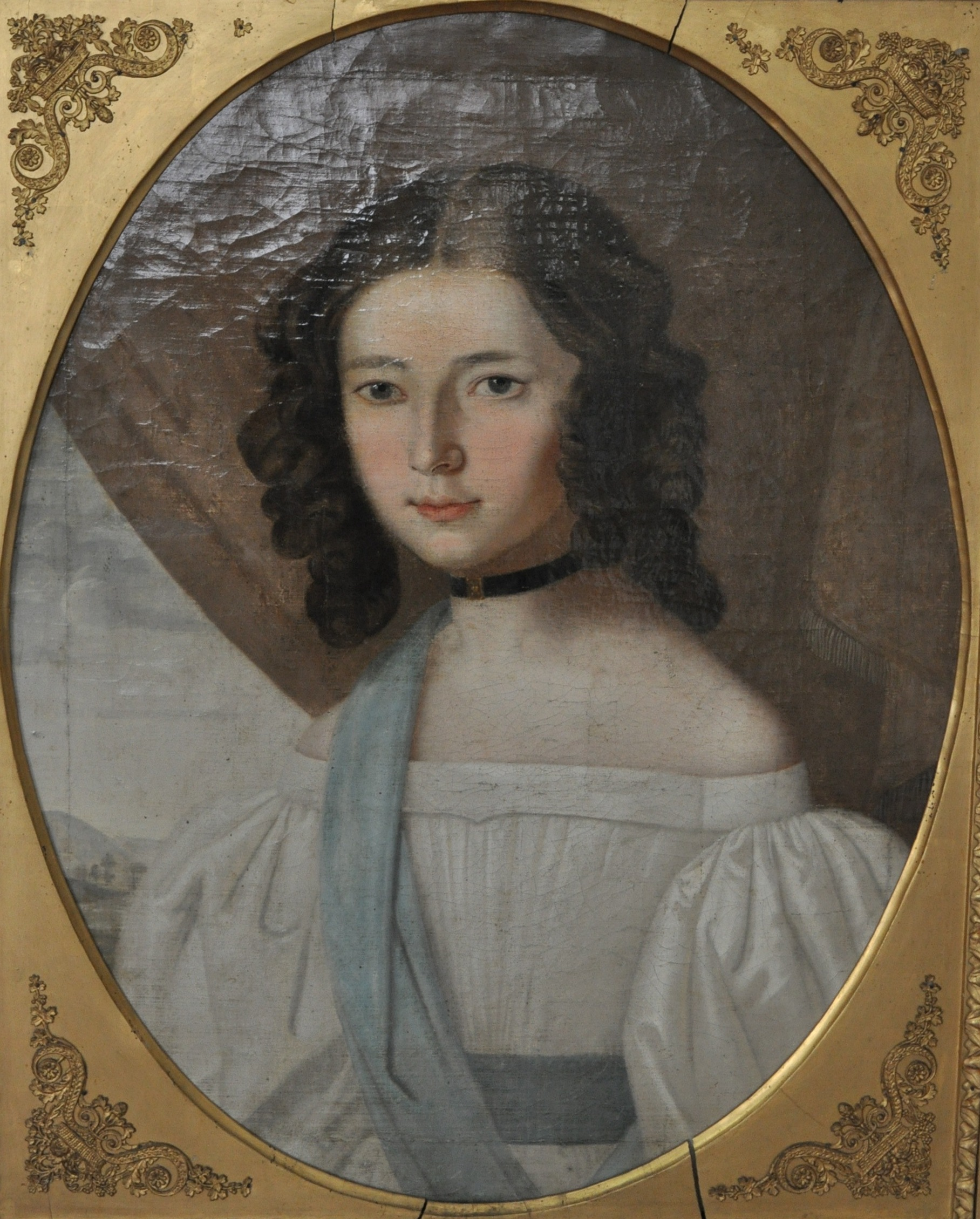 Portretul lui Sombori Ezster, Muzeul de Artă din Cluj